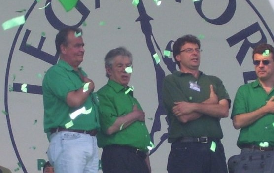 Calderoli, Bossi, Giorgetti e Cota durante l'Inno della Padania al termine del Raduno di Pontida del 2009.